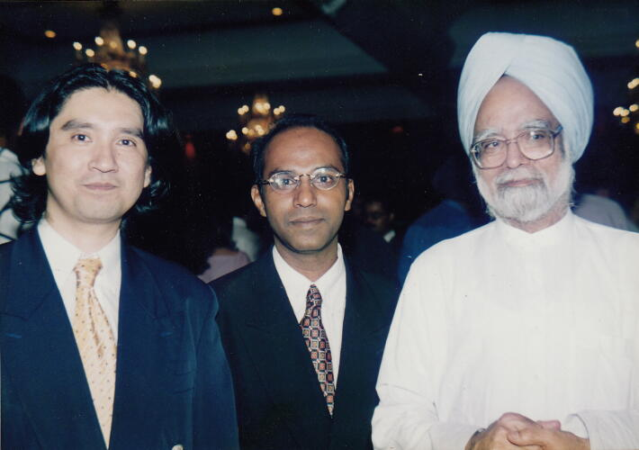 インド首相シン氏、画家ナレンダー氏、日比野貴之氏